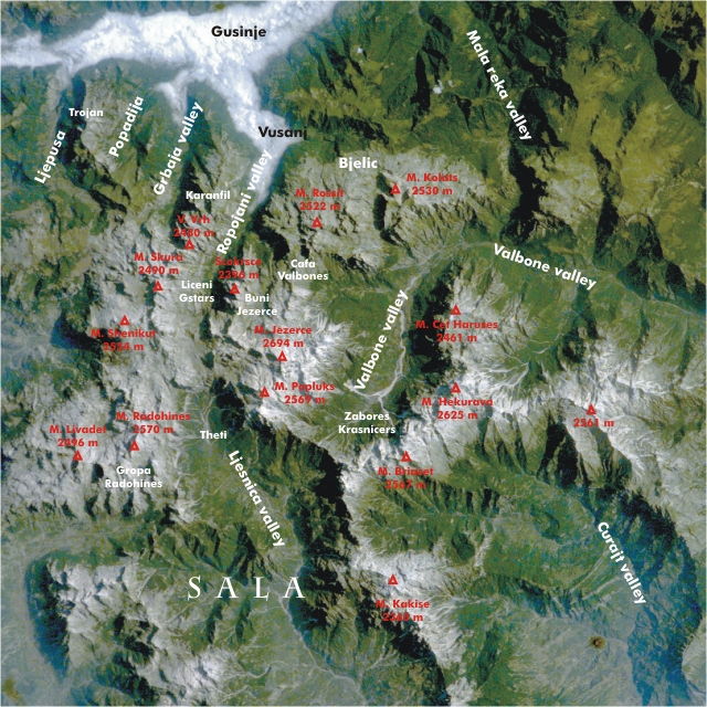 Space Shuttle Aufnahme der Südost-Dinariden